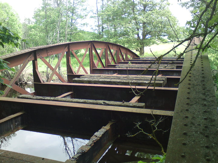 Railway bridge over Vramsån from the former Gärds Härads järnväg